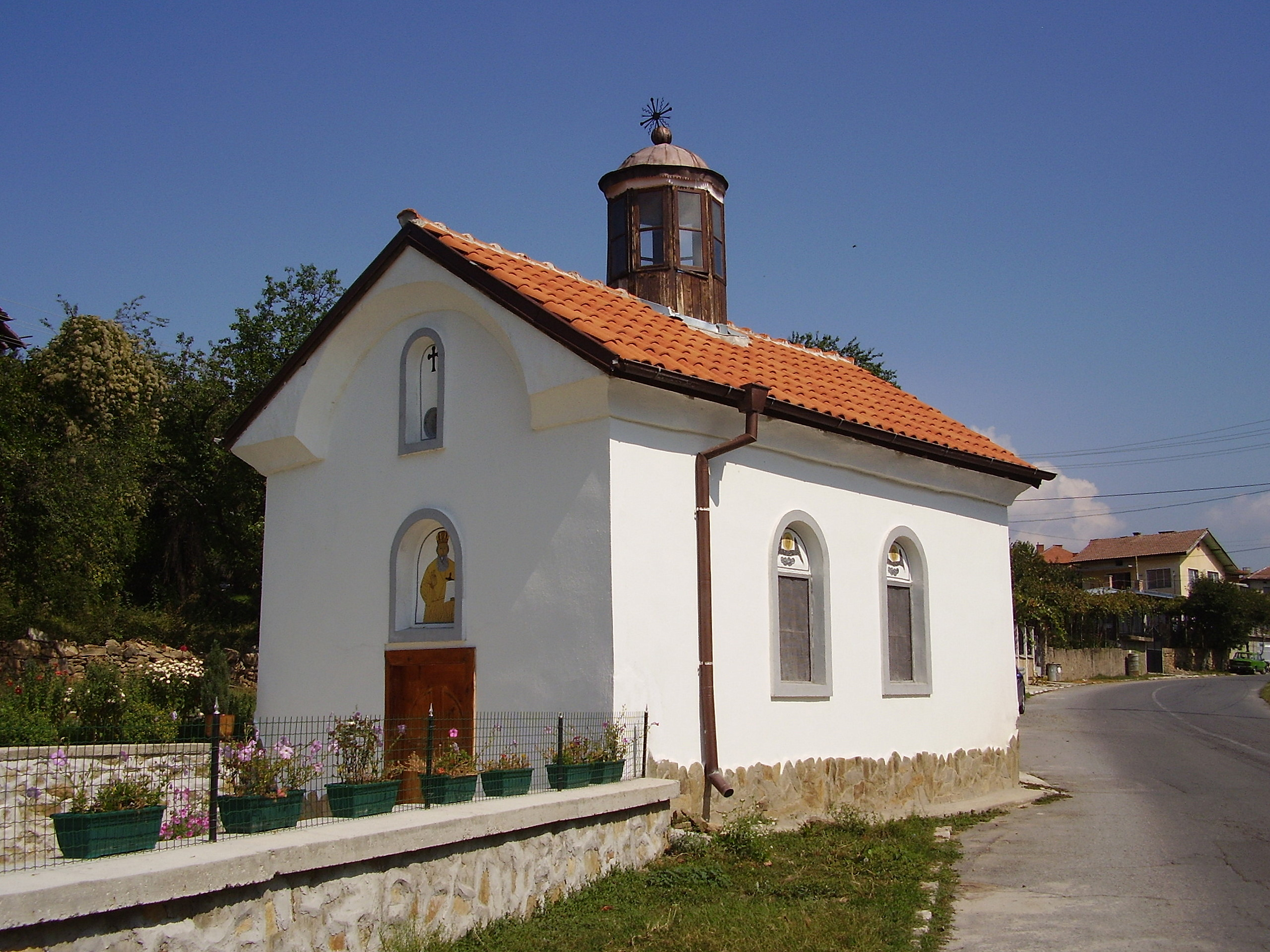 Църква "Свети Атанасий" - с.Соволяно